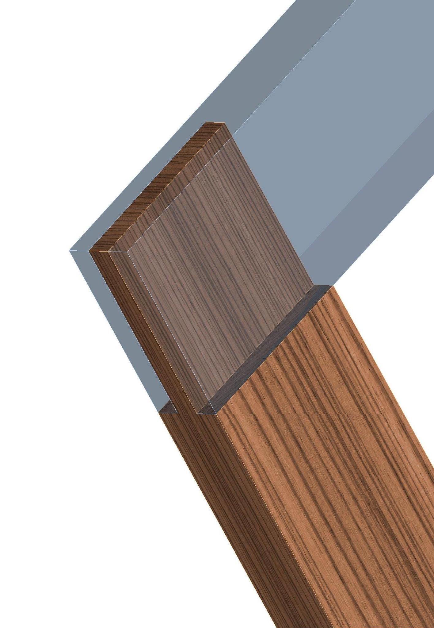 Holz-Rahmenbindungen Schlitz und Zapfenverbindung siehe Holzverbindung.